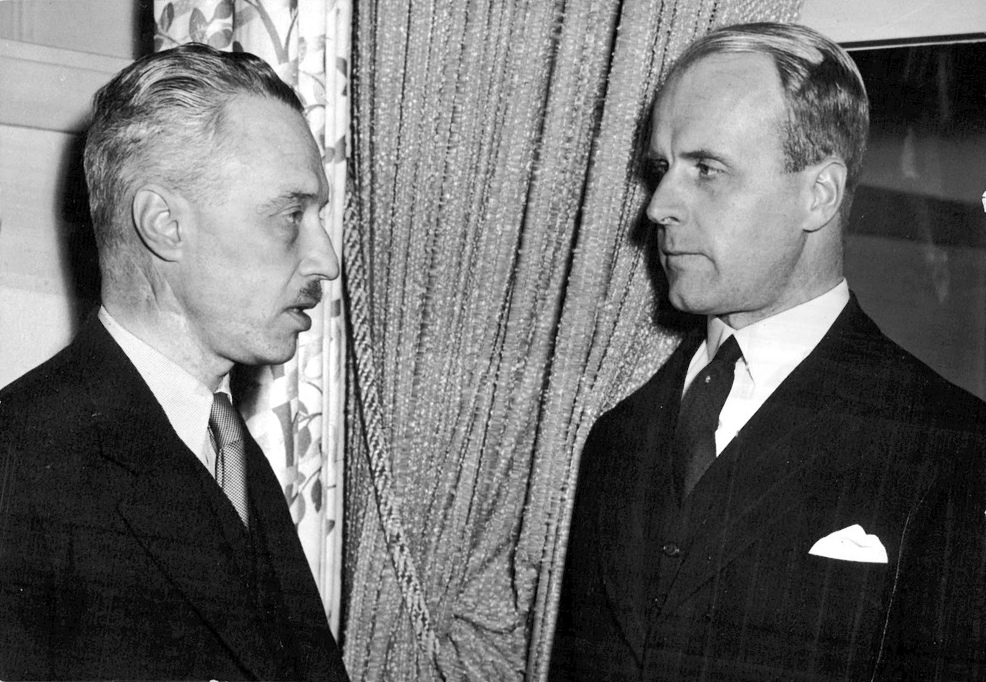 Generaldirektör Stig Ödeen och överingenjör B. C. Carlberg.Hemligstämpeln vilar tungt över den veckolånga konferens med de nyligen utsedda 24 krigsindustriombuden, som på måndagen inleddes av krigsmaterielverket. "Det ligger i sakens natur" säger generaldirektör Stig Ödeen vid ett samtal med Svenska Dagbladet att man först på lördag vid den då utlysta diskussionen väntat sig bärande riktlinjer för ombudens verksamhet. Den verksamheten blir verkligt viktig i krigstid då länsstyrelserna behöva stöd av industriexperter.